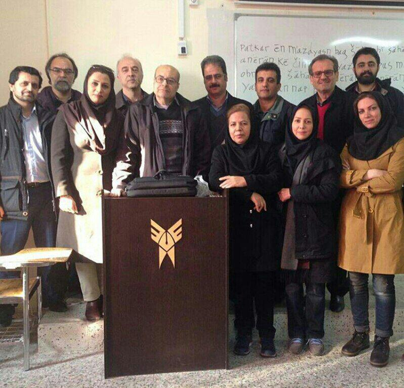 نادر میر سعیدی در میان دانشجویانش در کلاس درس زبان های باستانی، کارشناسی ارشد تاریخ ایران باستان در دانشگاه آزاد واحد تهران مرکزی (آبان 1395). نفر وسط ایستاده پشت میز.